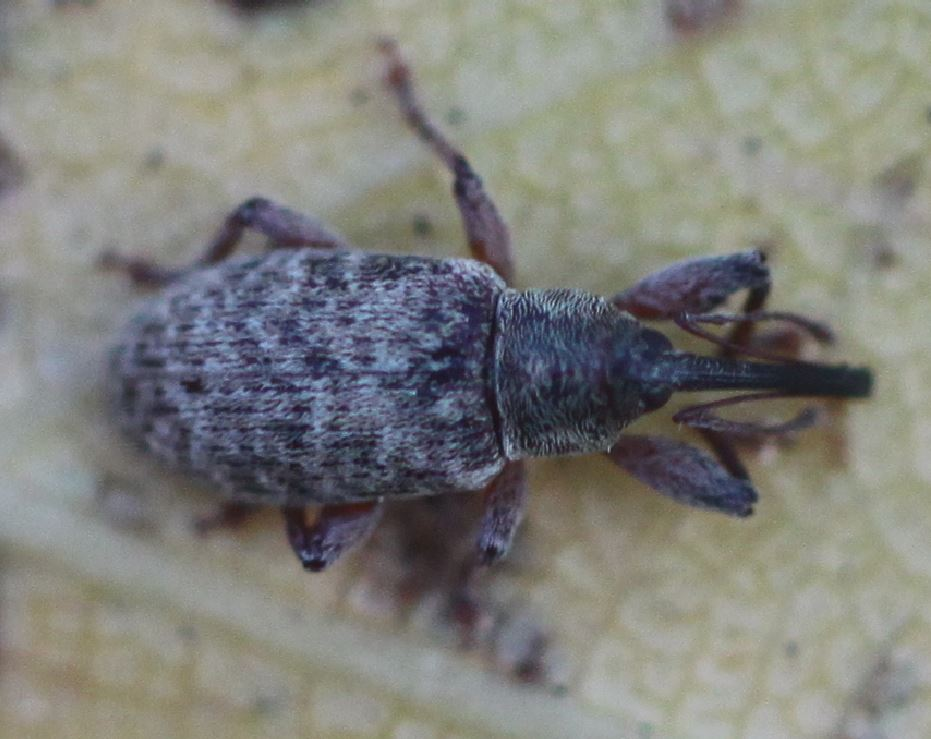 Rüsselkäfer Dorytomus filirostris, Männchen, am 16. November 2019 in der Nähe einer Pappelreihe